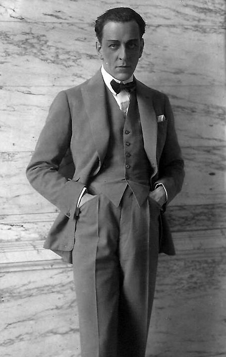 Ivar Kåge